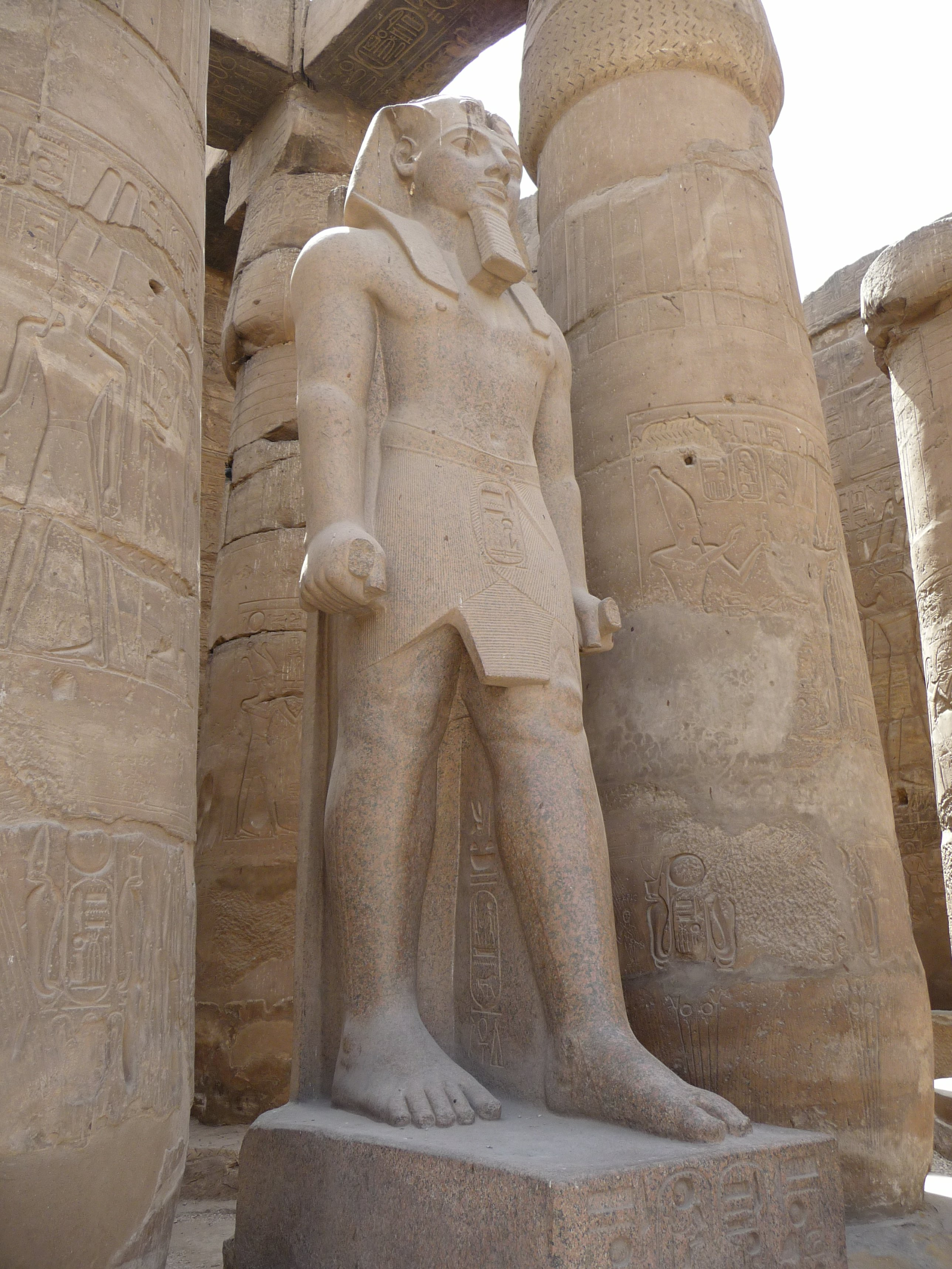 Luxor Temple